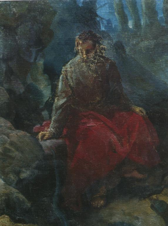 Искушение Христа